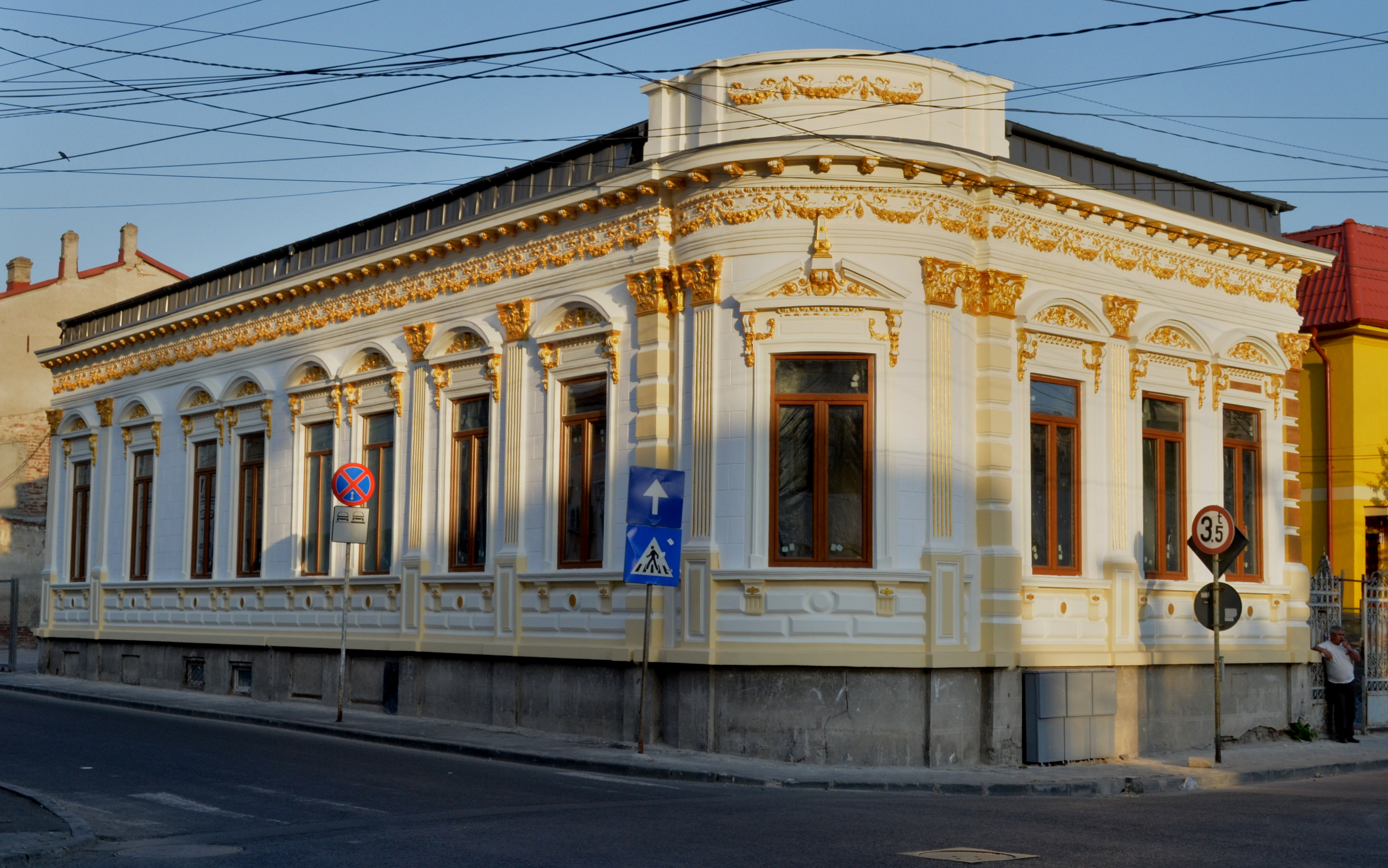 Casă, Strada Romulus nr. 59, Sector 3, București